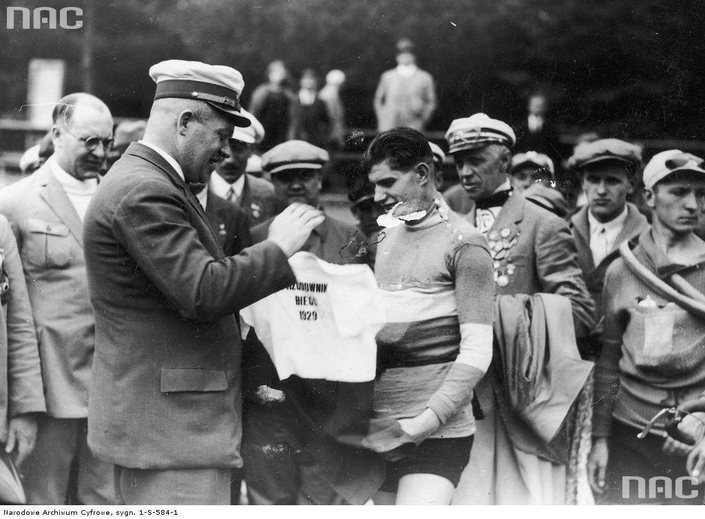 Wyścig kolarski Dookoła Polski – zakończenie I etapu Warszawa – Łódź (04.08.1929). Artur Thiele (prezes Łódzkiego Okręgowego Związku Kolarskiego od 1931) wręcza Józefowi Stefańskiemu koszulkę lidera z napisem "Przodownik biegu 1929"